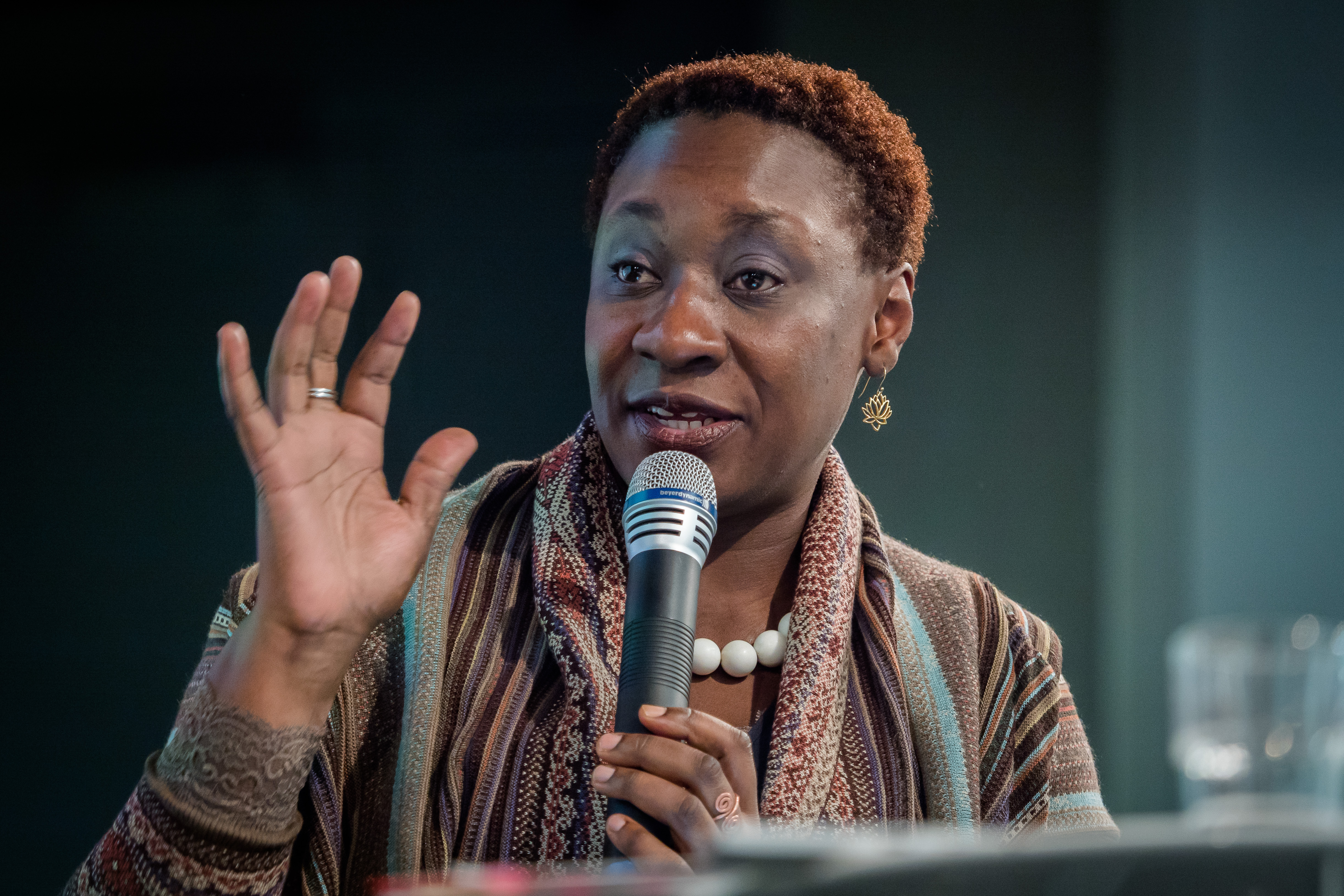 Prof‘in Maureen Maisha Auma (Hochschule Magdeburg-Stendal) Foto: Stephan Röhl